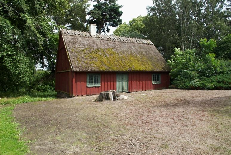 Stenbockens hus. Fältmarskalken Magnus Stenbock använde huset som huvudkvarter vid belägringen av Helsingborg 1710. Motiv: Hjälmshults kungsgård Nyckelord: Byggnadsminnen:Statl Kategori: Bostadshus, Kungsgård/kungsladugårdStenbockens hus. Fältmarskalken Magnus Stenbock använde huset som huvudkvarter vid belägringen av Helsingborg 1710.